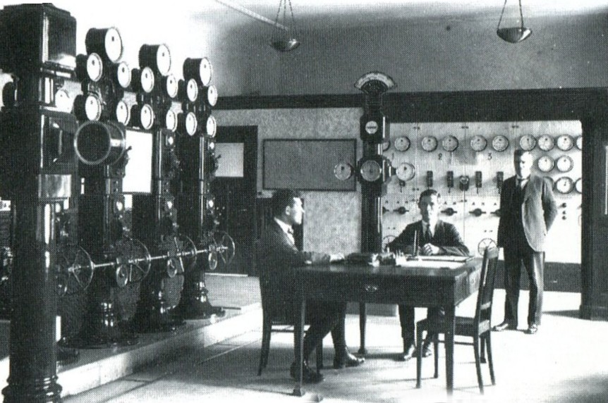 Manöverrummet i Untraverket